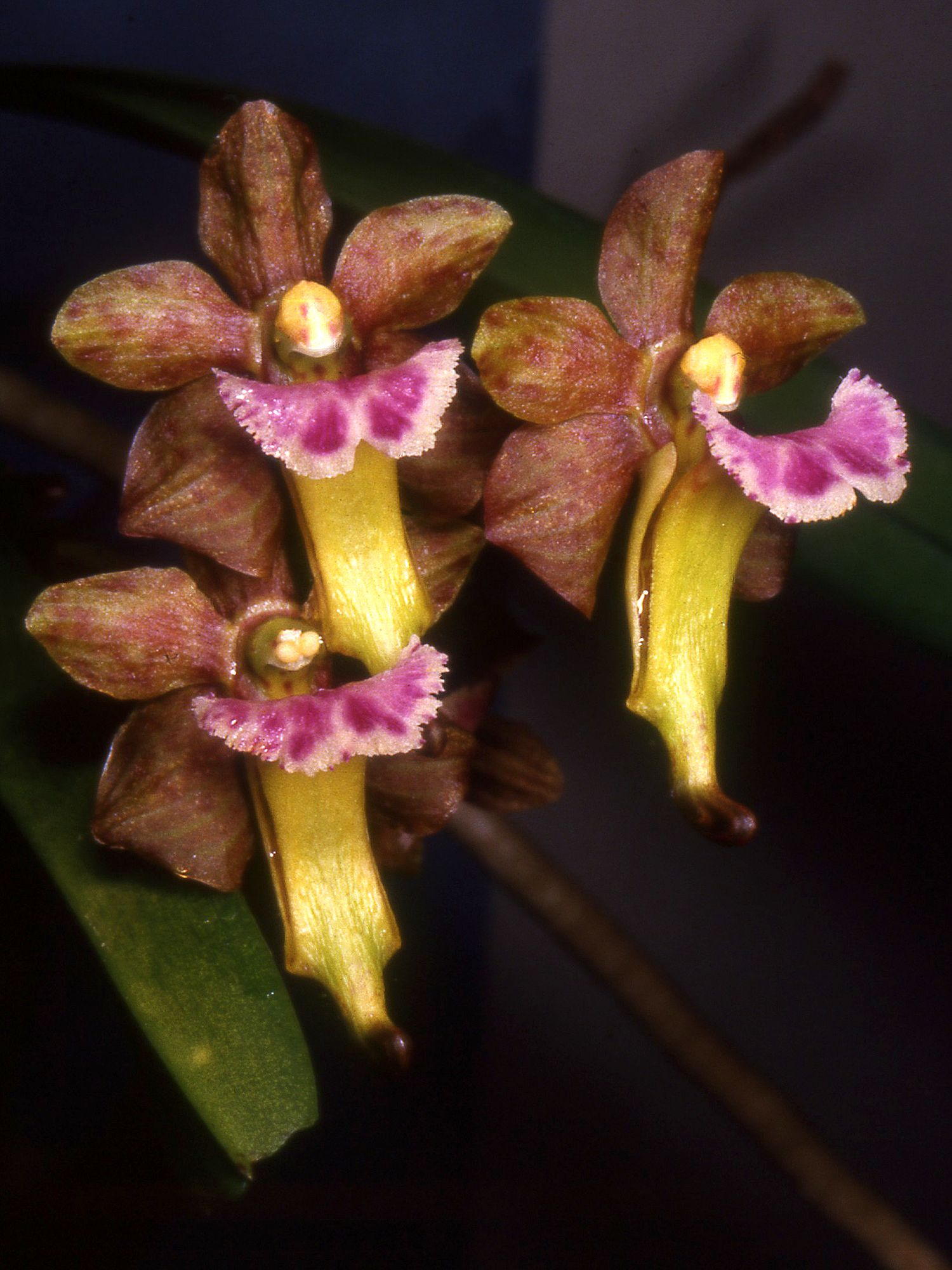 Aerides flabellata